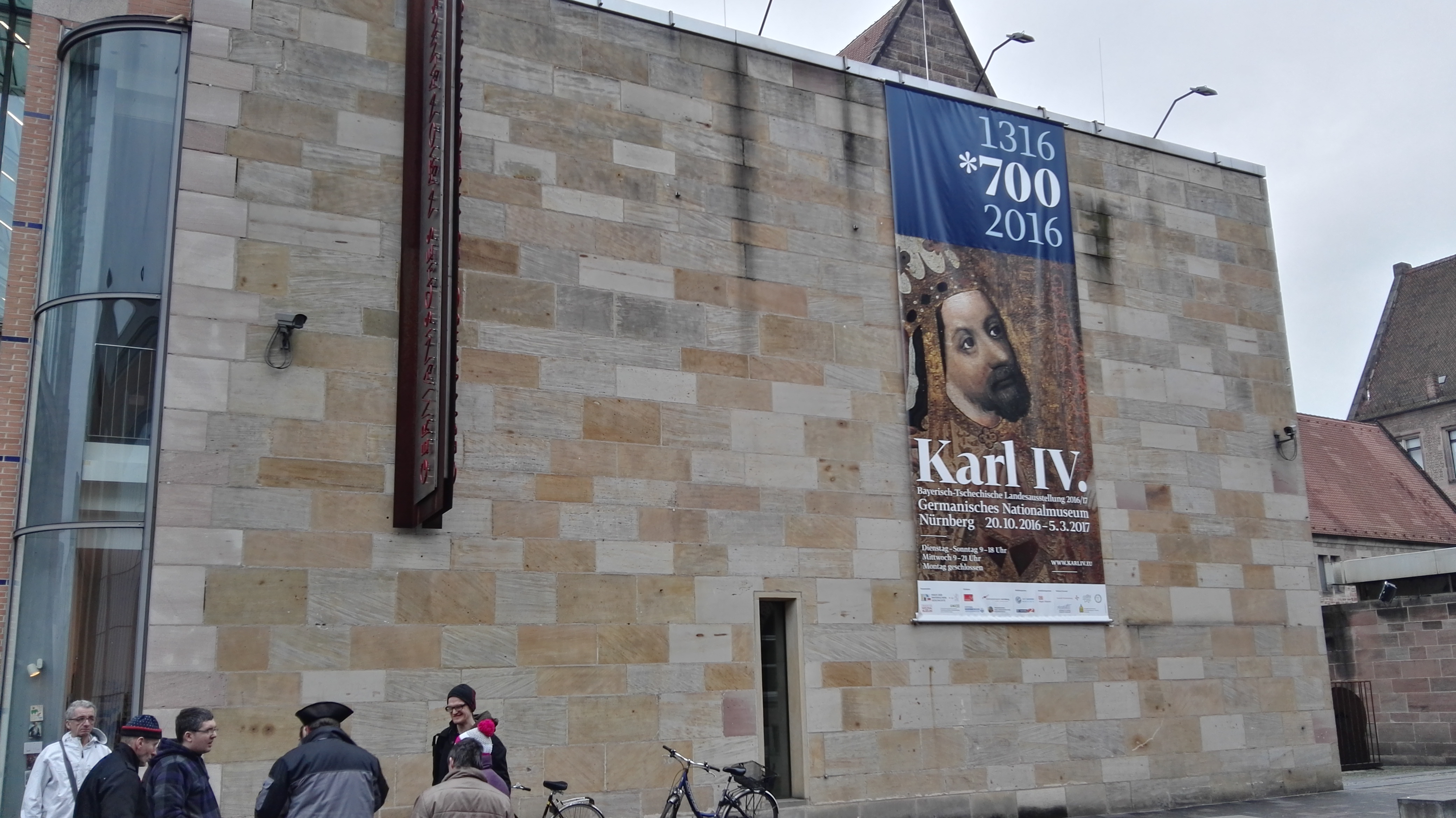 Ausstellung im Germanischen Nationalmuseum über Karl IV.